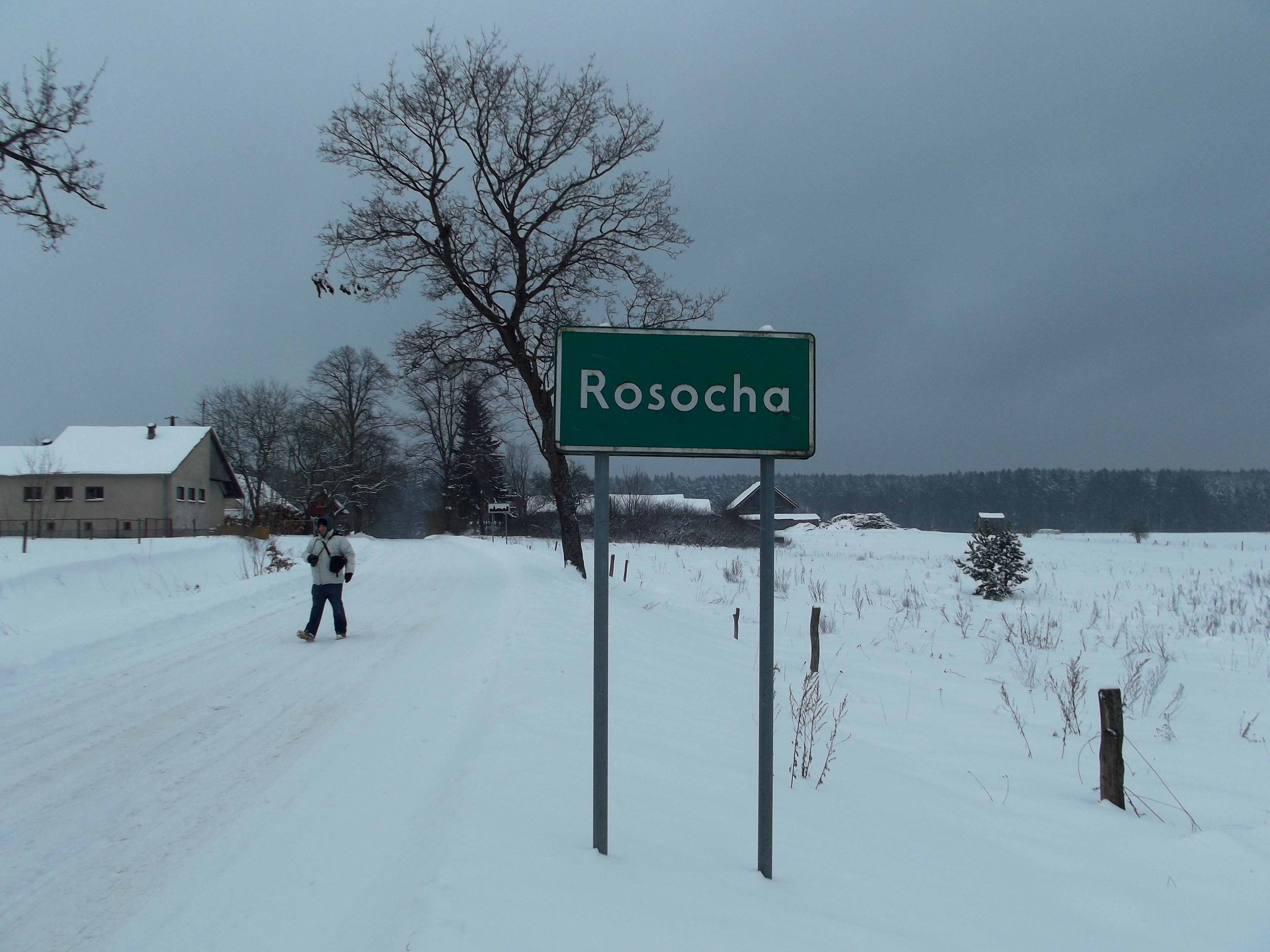 Znak Rosocha luty 2013